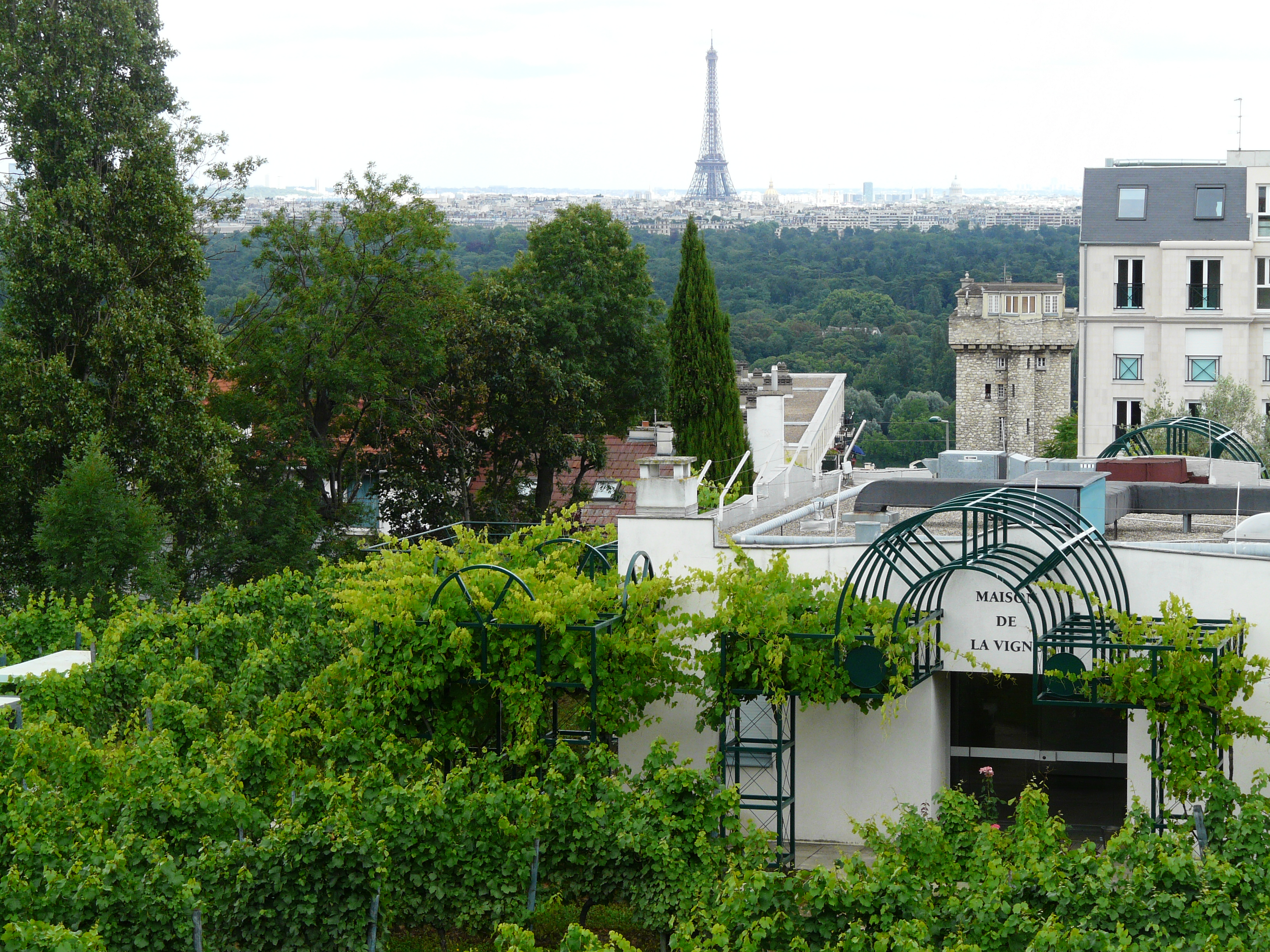 Maison de la vigne